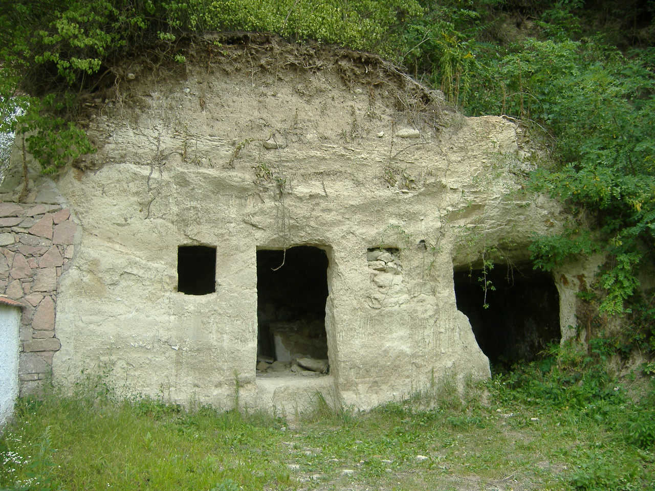 Elhagyott barlanglakás, Szomolya (Borsod-Abaúj-Zemplén megye)